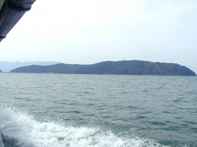 滋賀県近江八幡市の沖島 撮影者: ultratomio／撮影日: 2004年3月23日